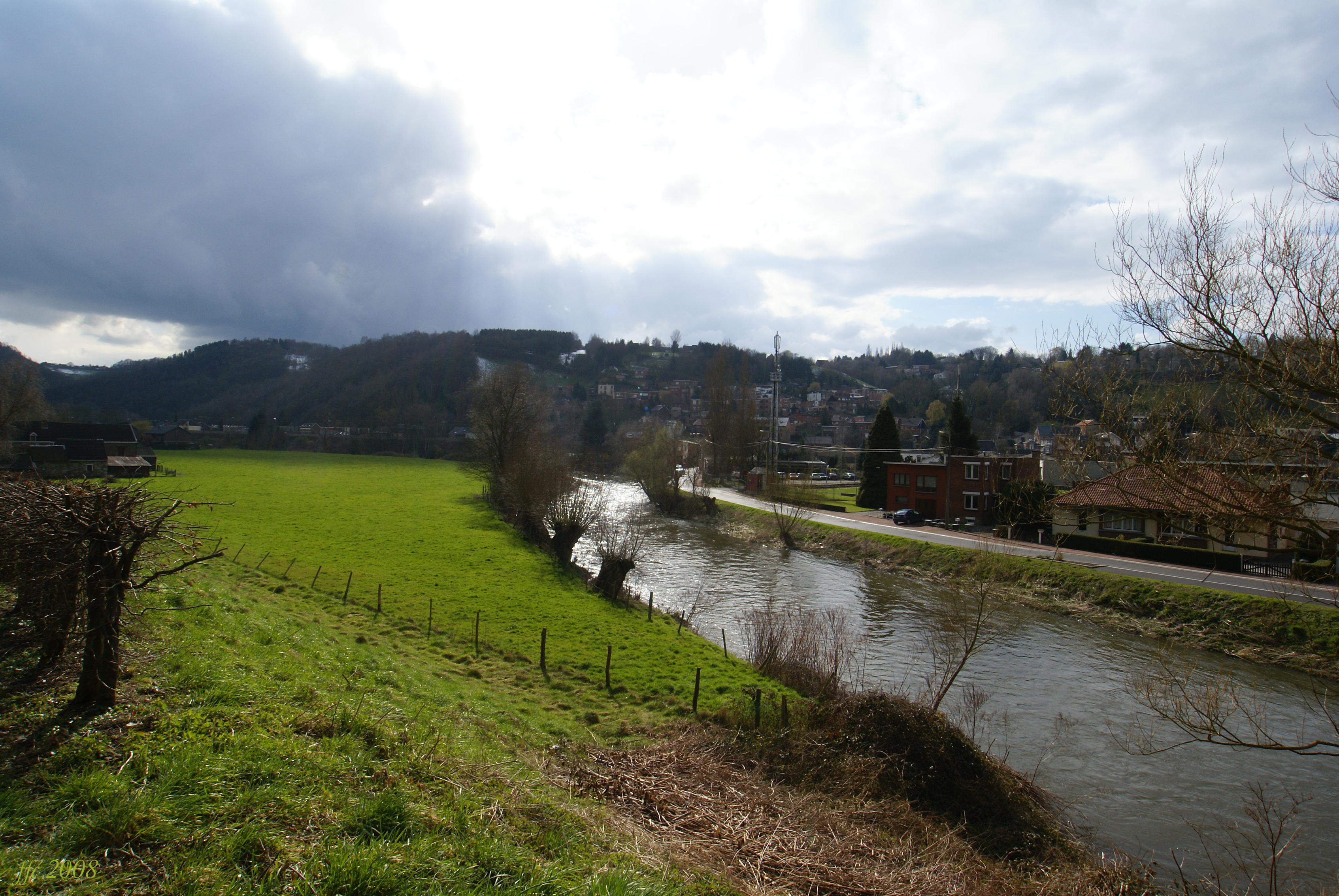 Vaux-sous-Chèvremont (Belgium) The river Vesdre between Vaux and Hauster El riu Vesdre entre Vaux i Hauster La Vesdre entre Vaux et Hauster De Vesder tussen Vaux en Hauster